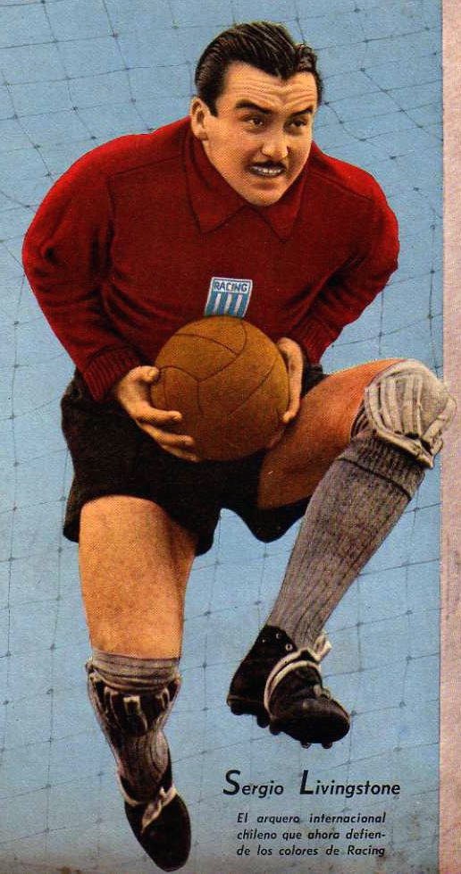 Sergio Roberto Livingstone Pohlhammer (*Santiago de Chile, 26 de marzo de 1920) en el uniforme del Racing Club. Fue un gran futbolista y actualmente es un comentarista deportivo de Television Nacional de Chile y conductor del programa Zoom Deportivo. Es apodado "Sapo" por la forma que tenía de atajar.